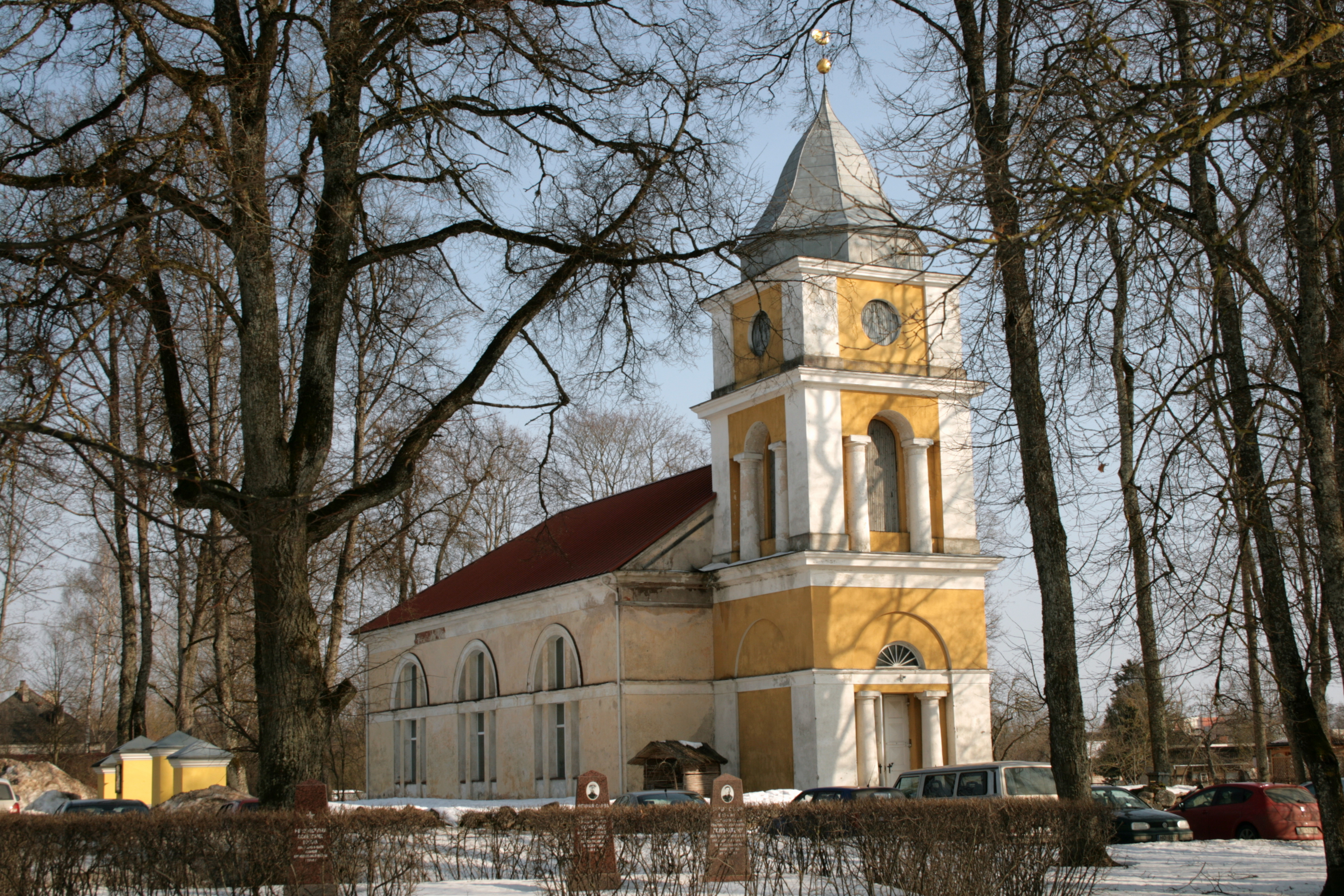 Baldone church